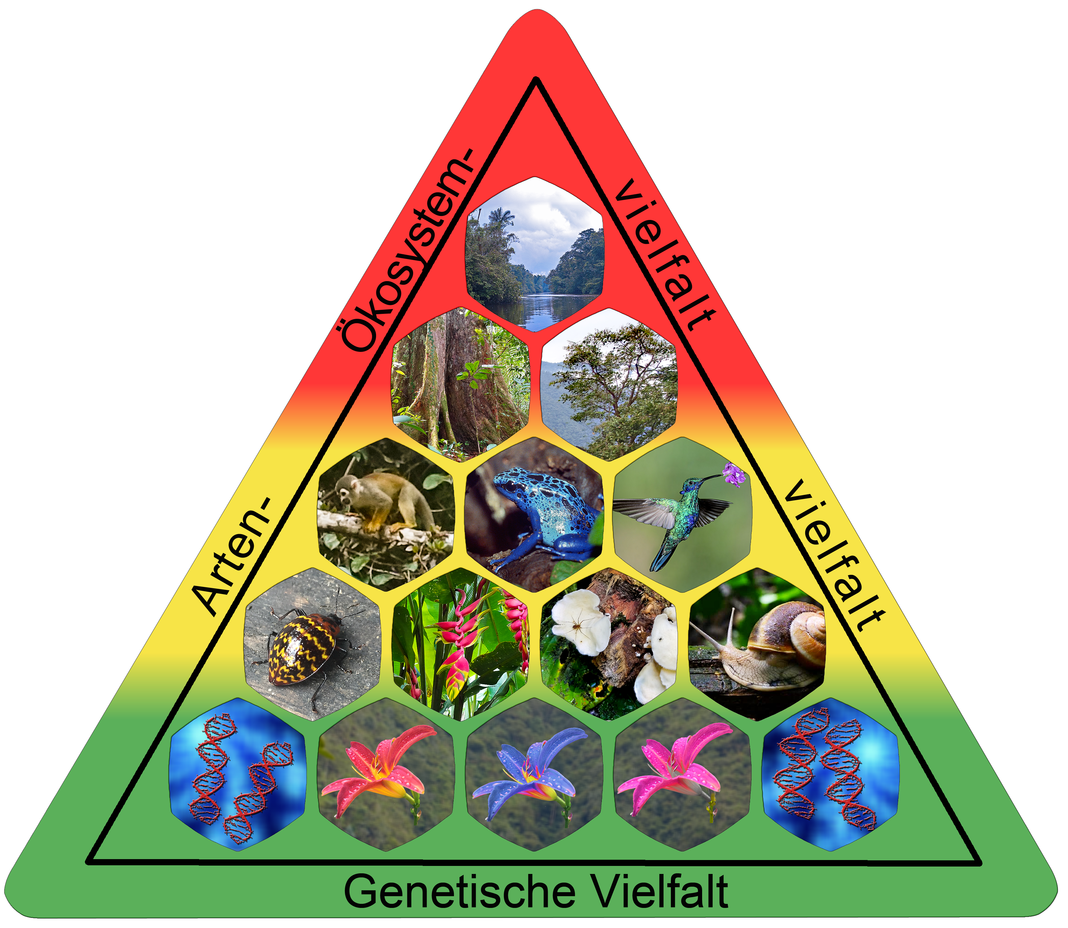 Grafische Darstellung der drei Ebenen der Biodiversität